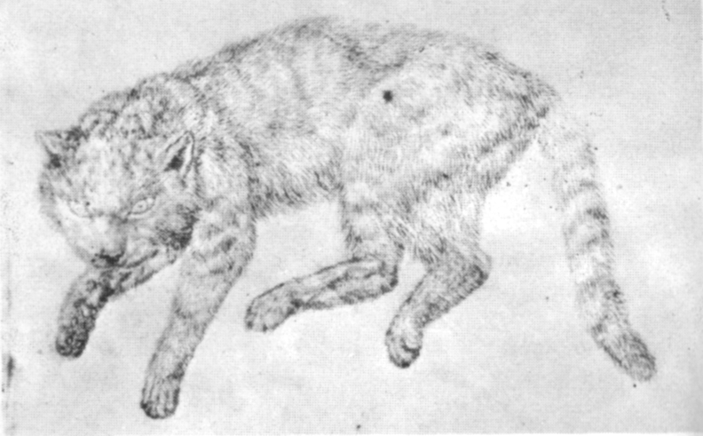 Pisanello, disegni, louvre 2422.jpg